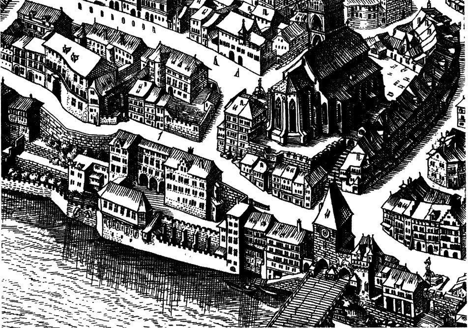 Базельский университет (план 1615 г.)